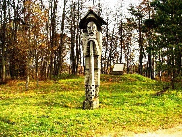 Skomantai, Klaipėdos raj. Skomantų piliakalnio Rūpintojėlis Foto: Vytis1, 2005 m. rugsėjo mėn., Lietuva